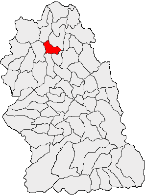 Categorie:Hărţi ale judeţului Hunedoara